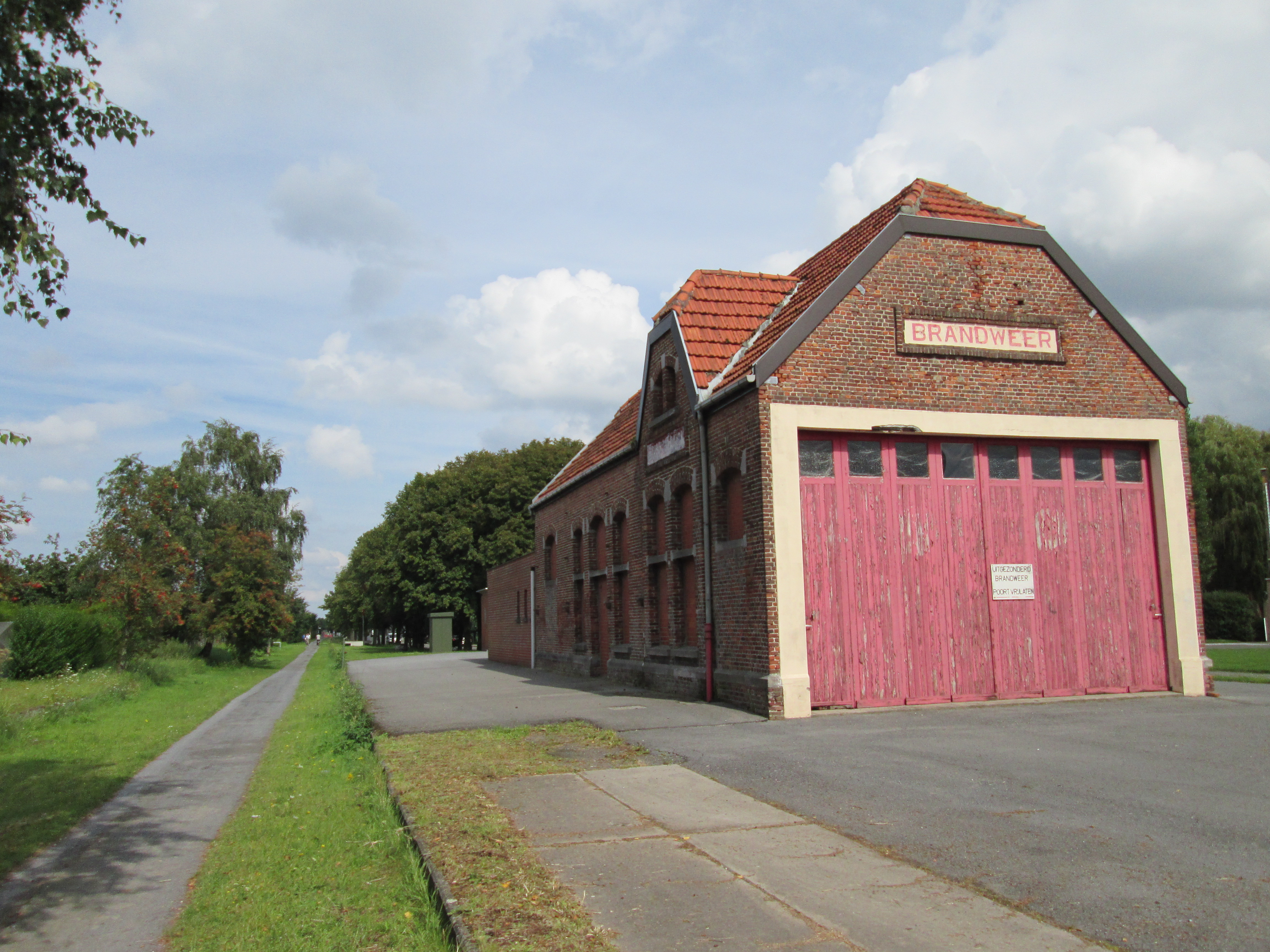 Zicht op het voormalige stationsgebouw van Langemark.